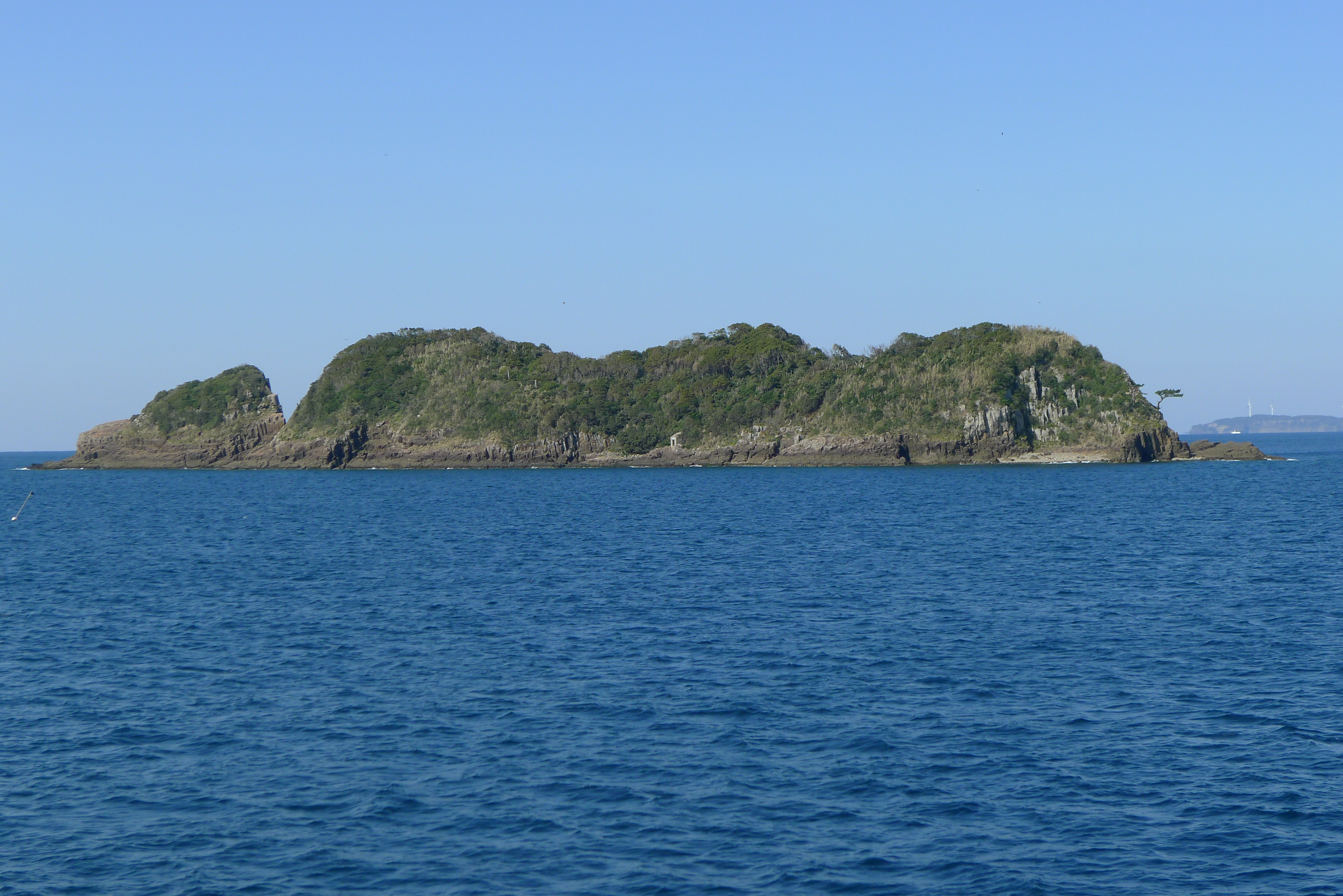 世界遺産「長崎と天草地方の潜伏キリシタン関連遺産」の構成資産である中江ノ島。五島発博多行のフェリー太古船上から撮影。上陸が禁じられ、周辺での船釣りもできないことから漁船をチャーターしても近づけないため、現在合法的に最も近づけるのがこの航路となる。